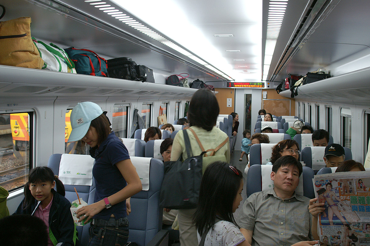 TEMU1000內部